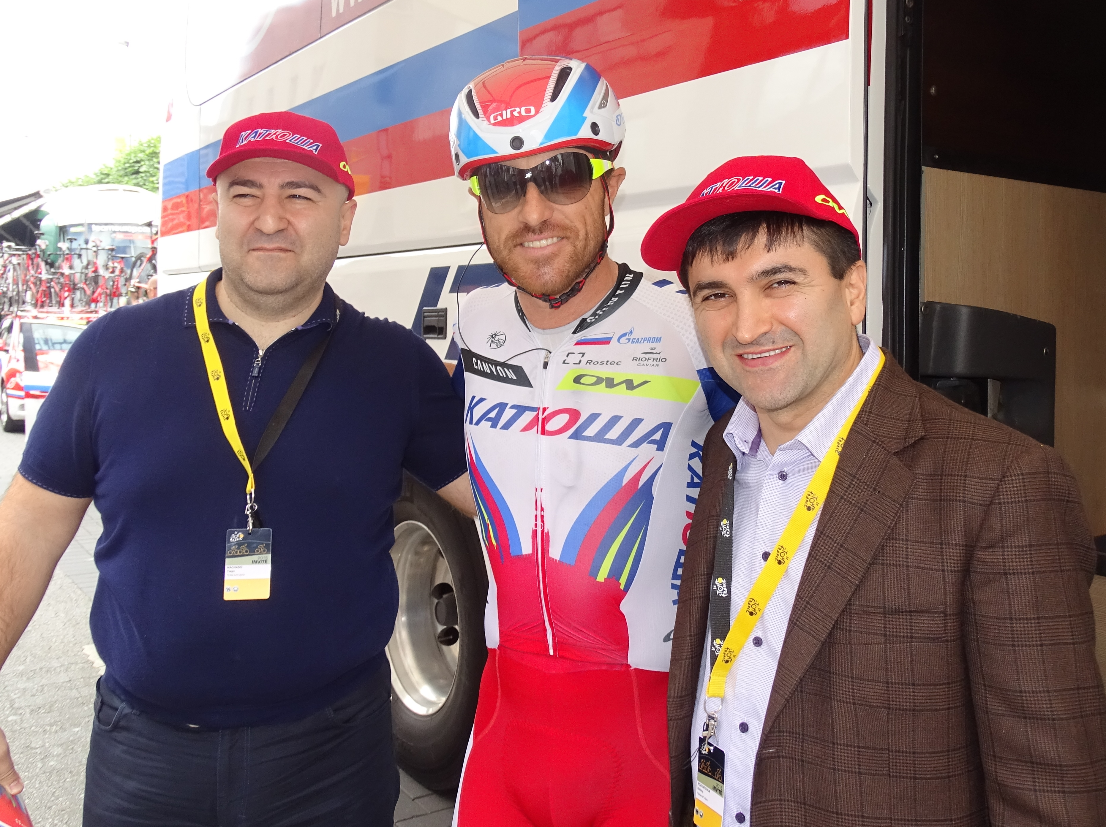 Reportage réalisé le lundi 6 juillet à l'occasion du départ de la troisième étape du Tour de France 2015 à Anvers, Belgique.